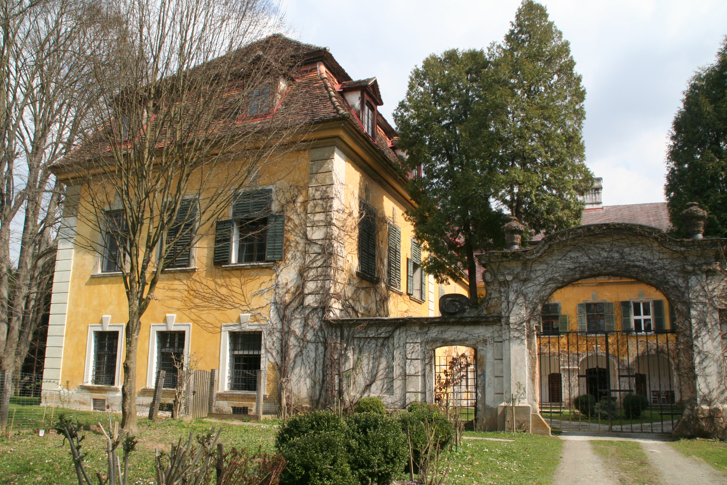 Schloss Dornegg